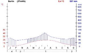 Klimadiagram efter Heinrich Walters opstilling. Her er brugt data fra Berlin. Søjlerne angiver nedbørsmængden og kurven temperaturen. Begge dele er middelværdier pr. måned.